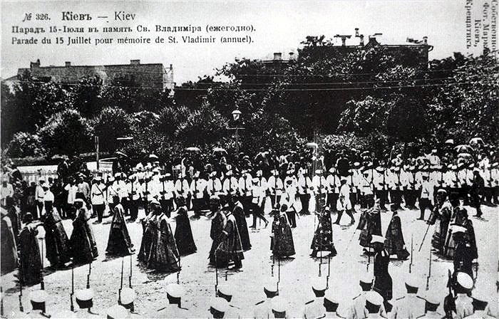 Парад в честь святого равноапостольного князя Владимира в Киеве, 15 июля 1888 г. (по старому стилю)